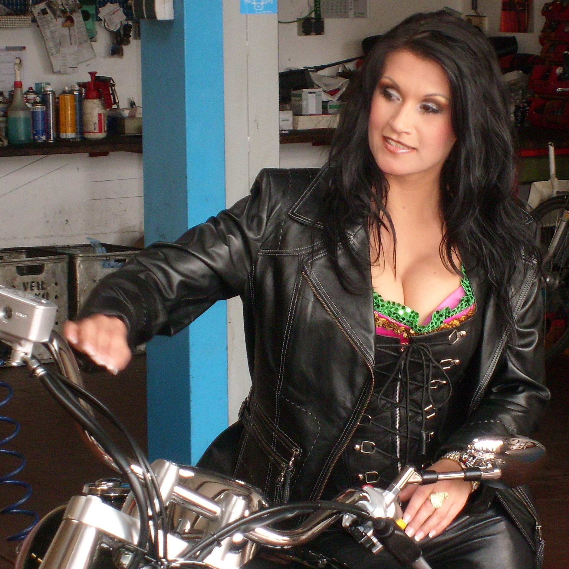 Antonia auf ihrem Lieblingsmotorrad